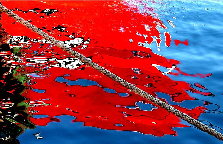 Corda no porto pesqueiro da Coruña .